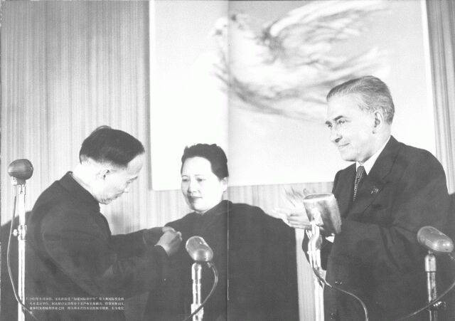 1951年9月18日，宋庆龄接受“加强国际和平年”斯大林国际奖金典礼在北京举行。 宋庆龄决定将奖金十万卢布全部献出，作发展我国儿童和妇女的福利事业之用。 图为郭沫若给宋庆龄佩带勋章。右为爱伦堡。